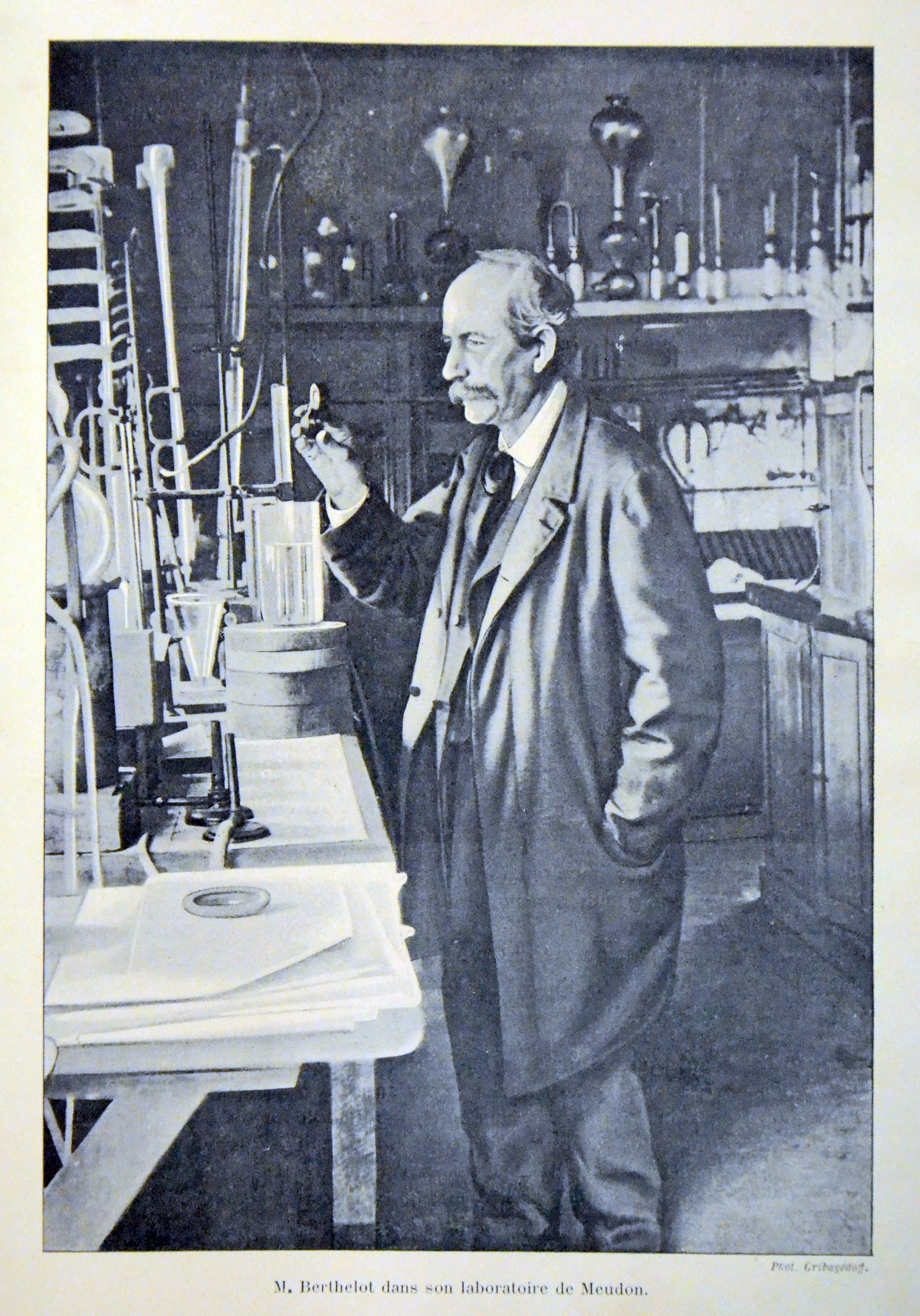 Photo légendée "Mr. Berthelot dans son laboratoire de Meudon" Photo ancienne, extraite d'un article de la revue française "Revue illustrée" (Tome relié 1902), portant sur Pierre Eugène Marcellin Berthelot, né le 25 octobre 1827 à Paris et mort le 18 mars 1907, Cliché : Valérian Gribayedoff.